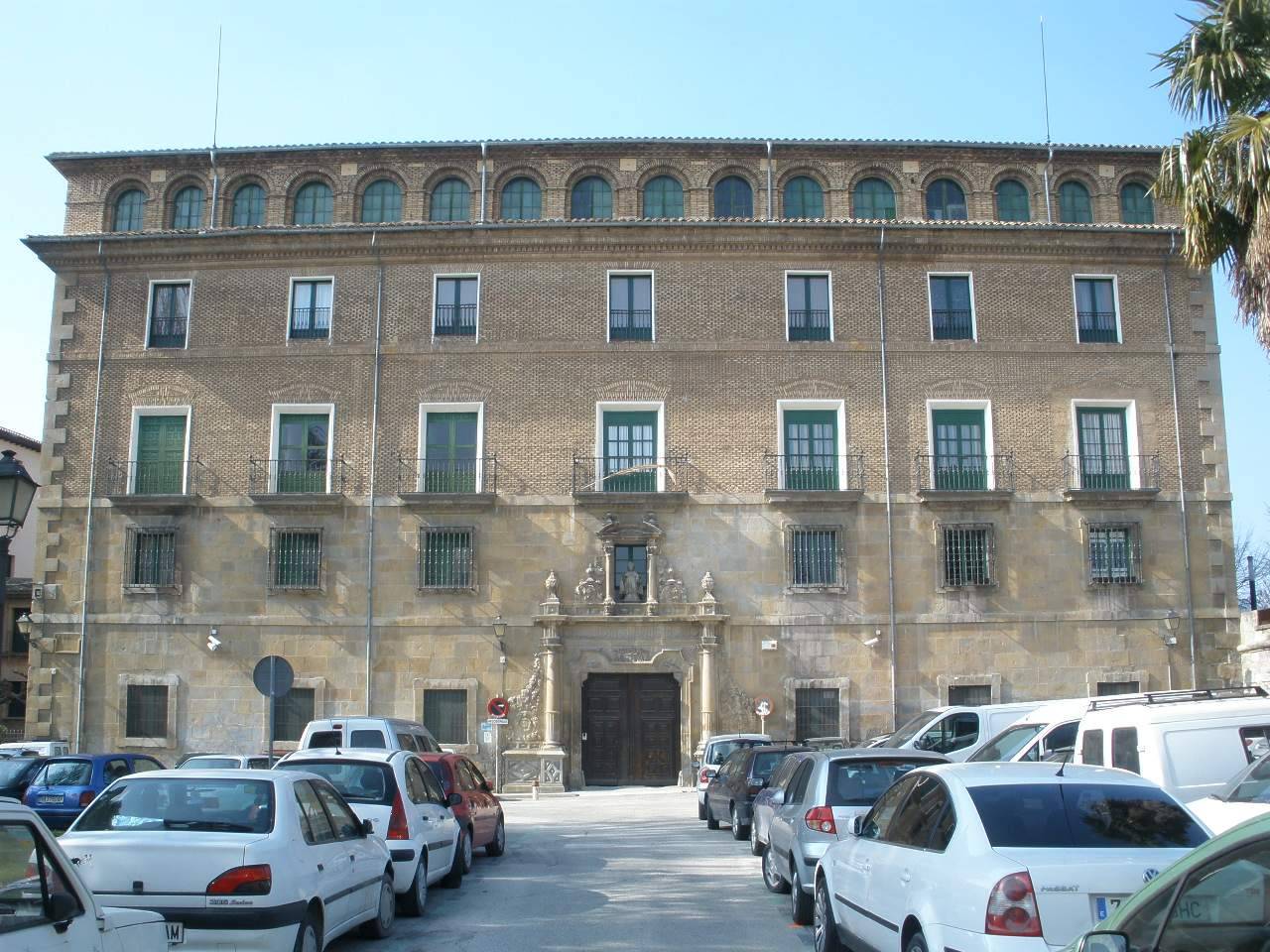 Palacio Arzobispal de Pamplona